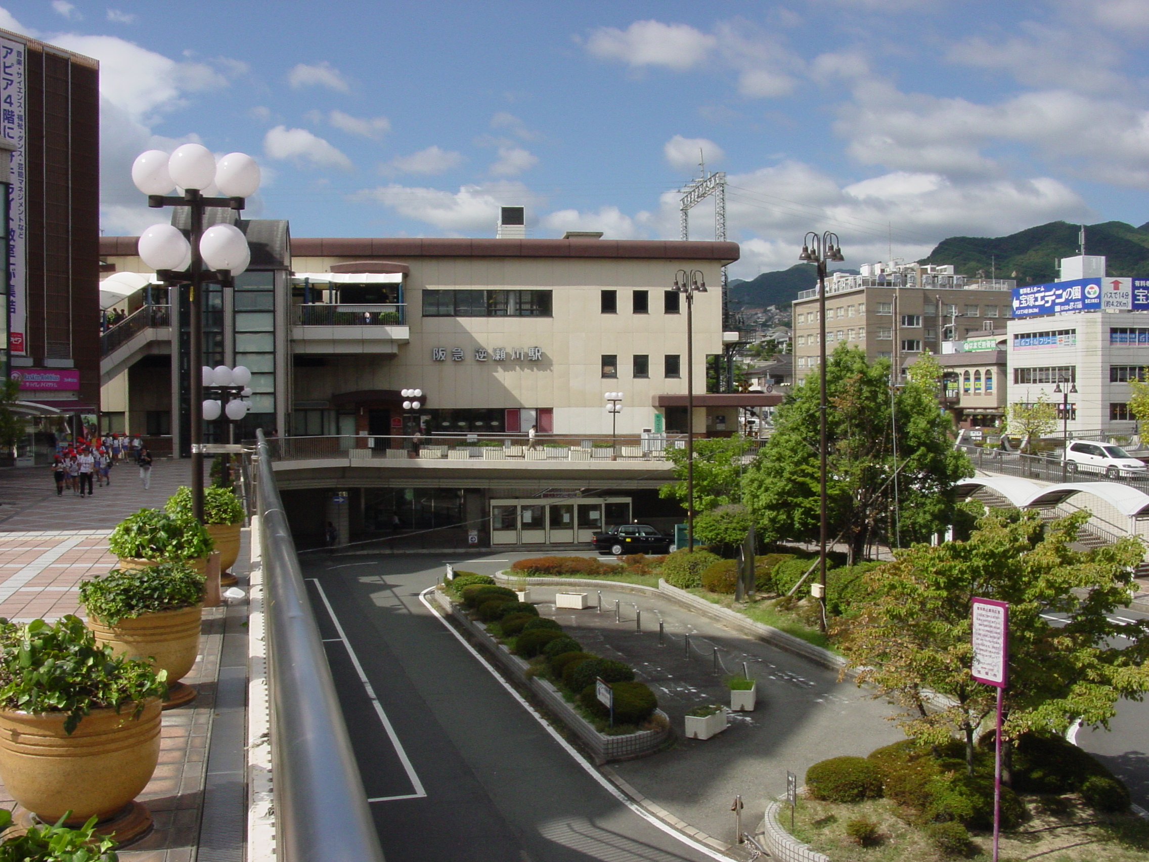 逆瀬川駅の東側ロータリー